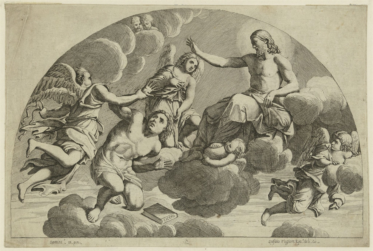 Domenico Zampieri, genannt Domenichino, Maler, Erfinder: Die Vision des Heiligen Hieronymus / Christus auf Wolken sitzend, weist die Weltweisheit von sich, 1604 - 1750